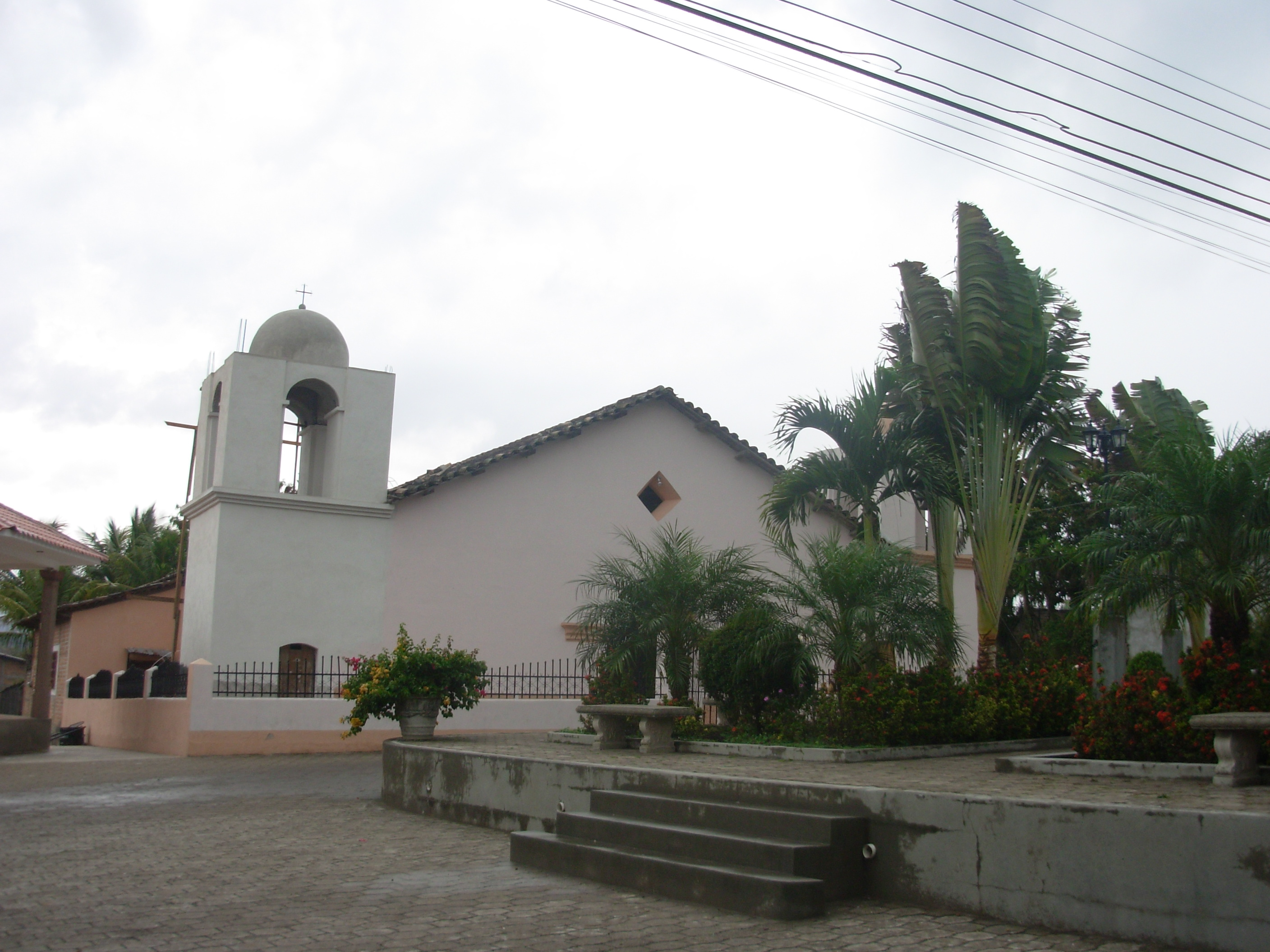 Santa Fe (Ocotepeque, Honduras), parque y templo